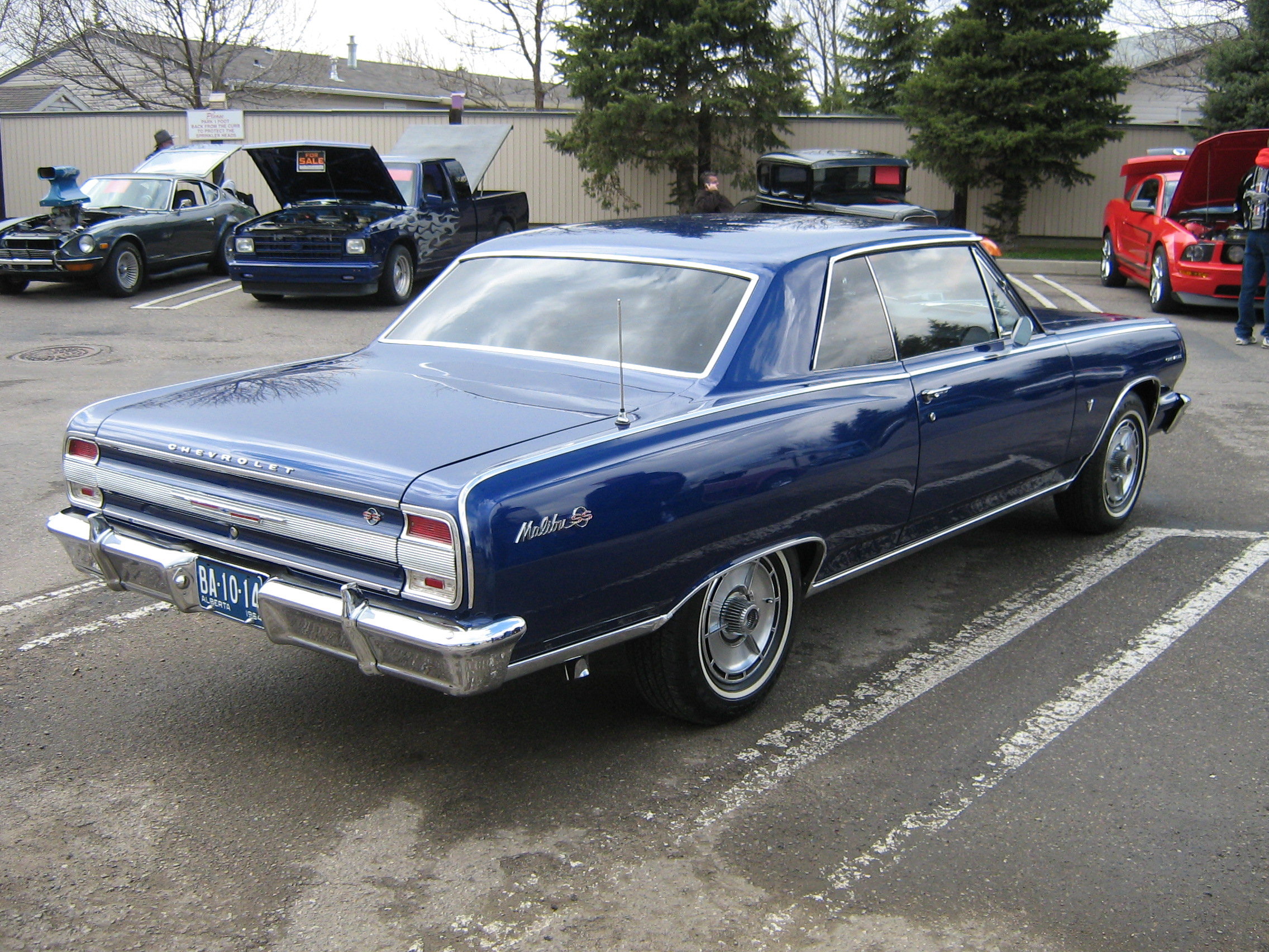 Chevrolet Malibu